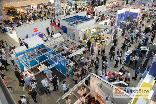 A rendezvény tavasszal és ősszel is várja a karrierépítés iránt érdeklődőket.